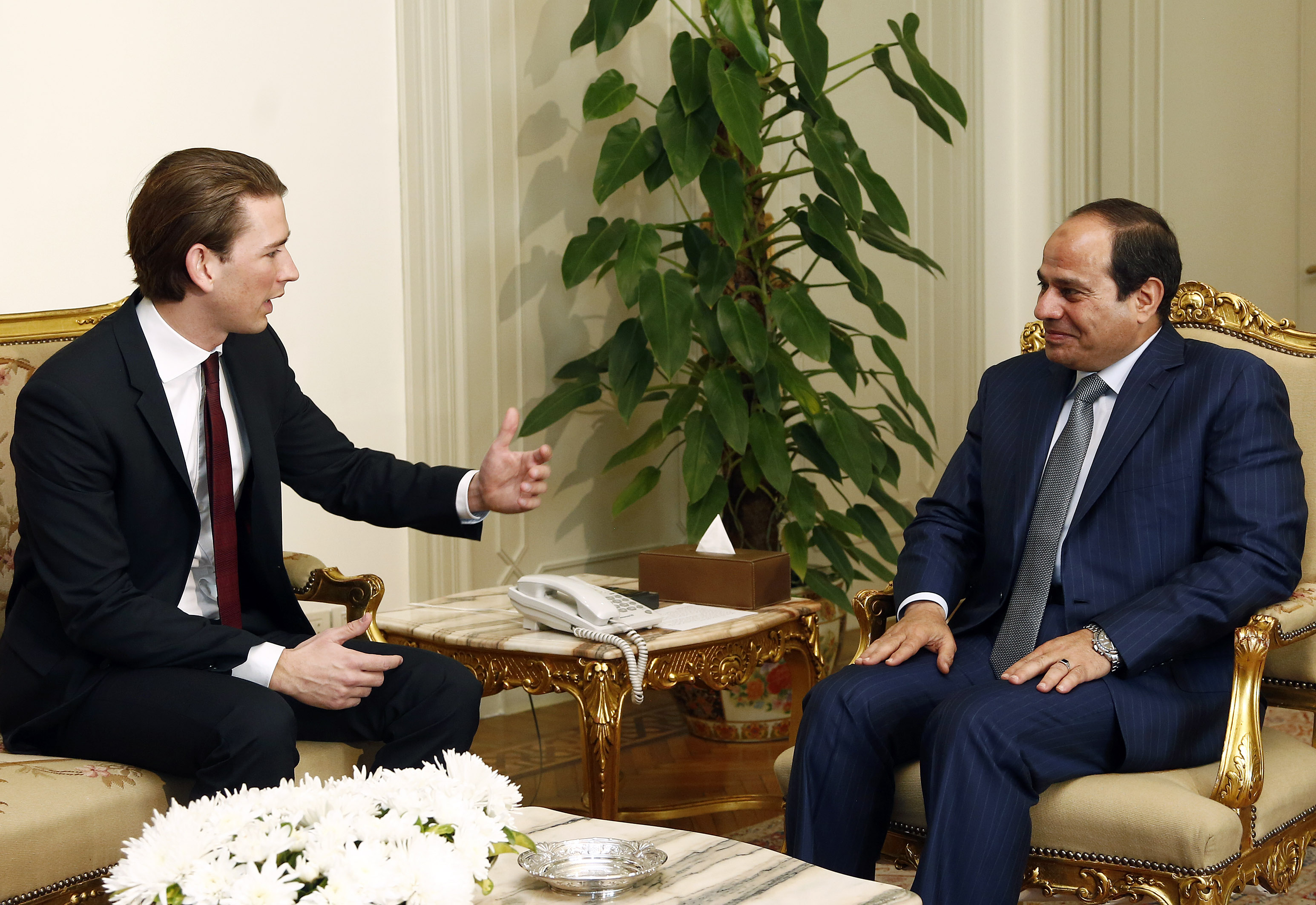 Arbeitsbesuch Ägypten. Außenminister Sebastian Kurz im Gespräch mit dem ägyptischen Präsidenten Abdel Fattah Al Sisi. Kairo, 21.05.2015, Foto: Dragan Tatic